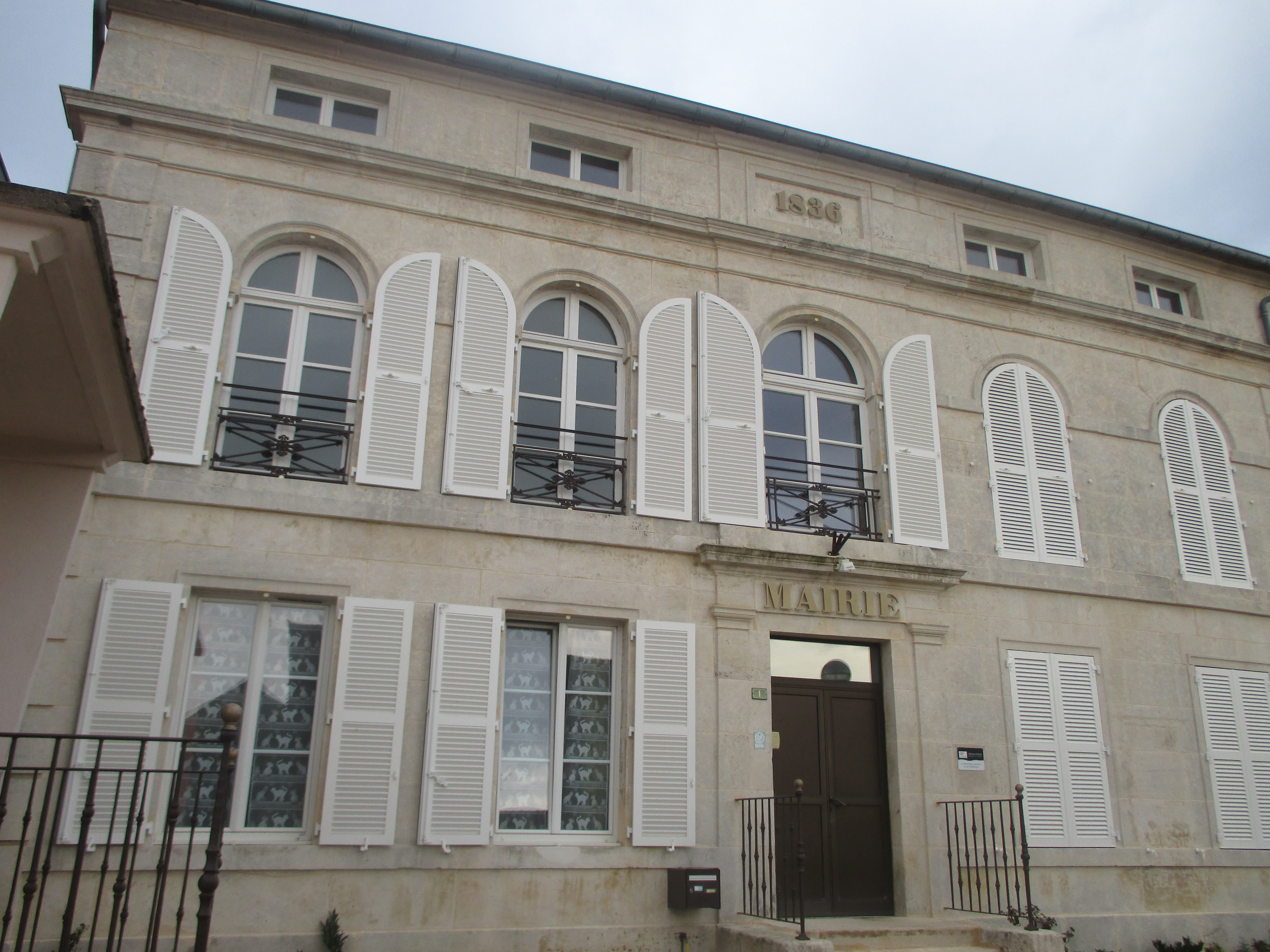 Voici une mariée